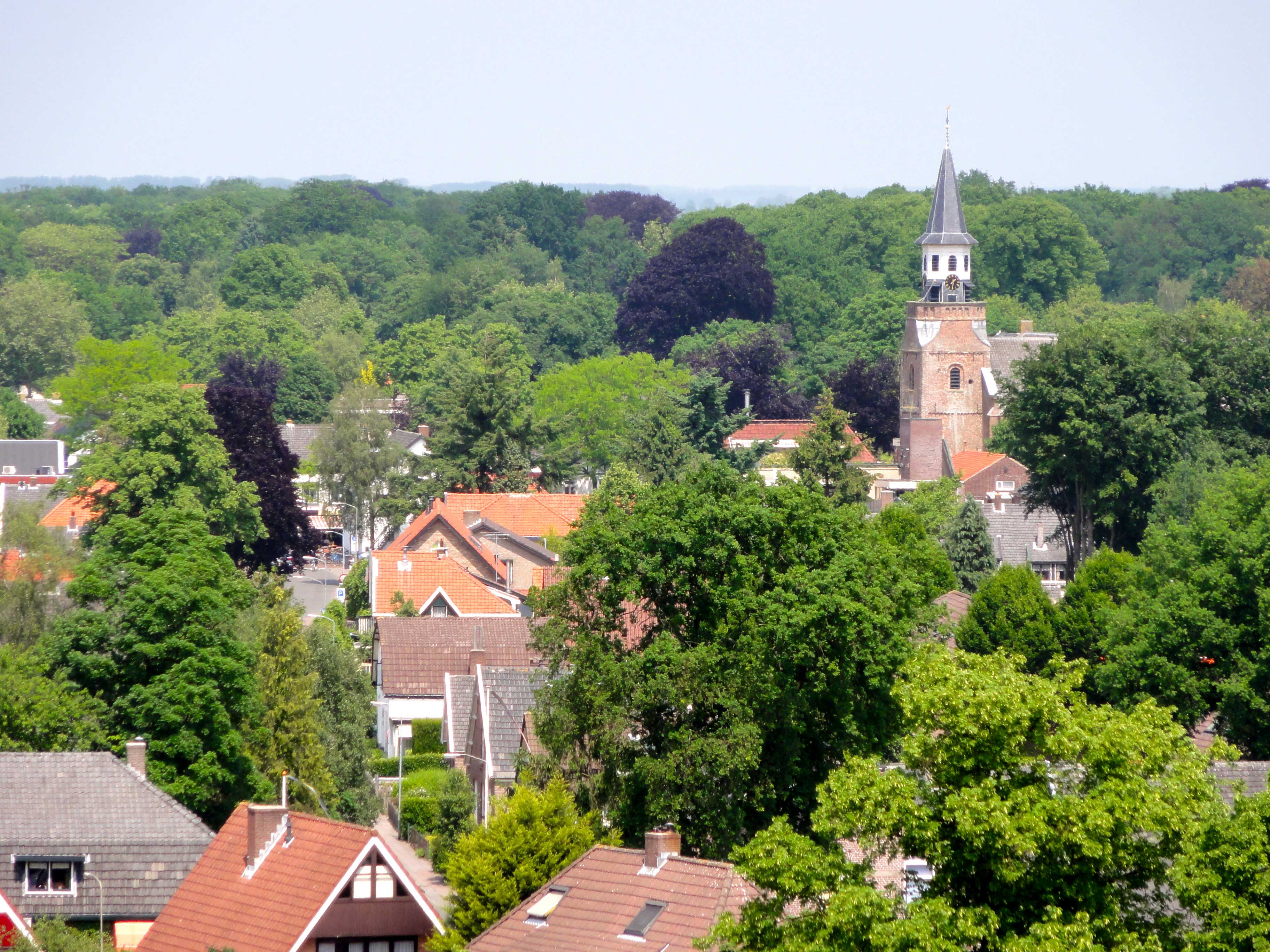 Zicht op Nunspeet met kerk